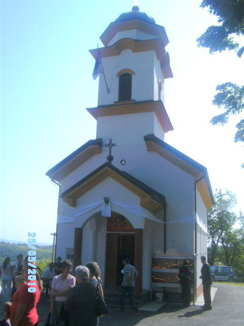 Црква Свете тројице у Стратинској Licensing